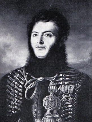 Jacques-Gervais Subervie (1776-1856), général et baron d'Empire, puis inspecteur général de la cavalerie et ministre de la Guerre sous la monarchie.